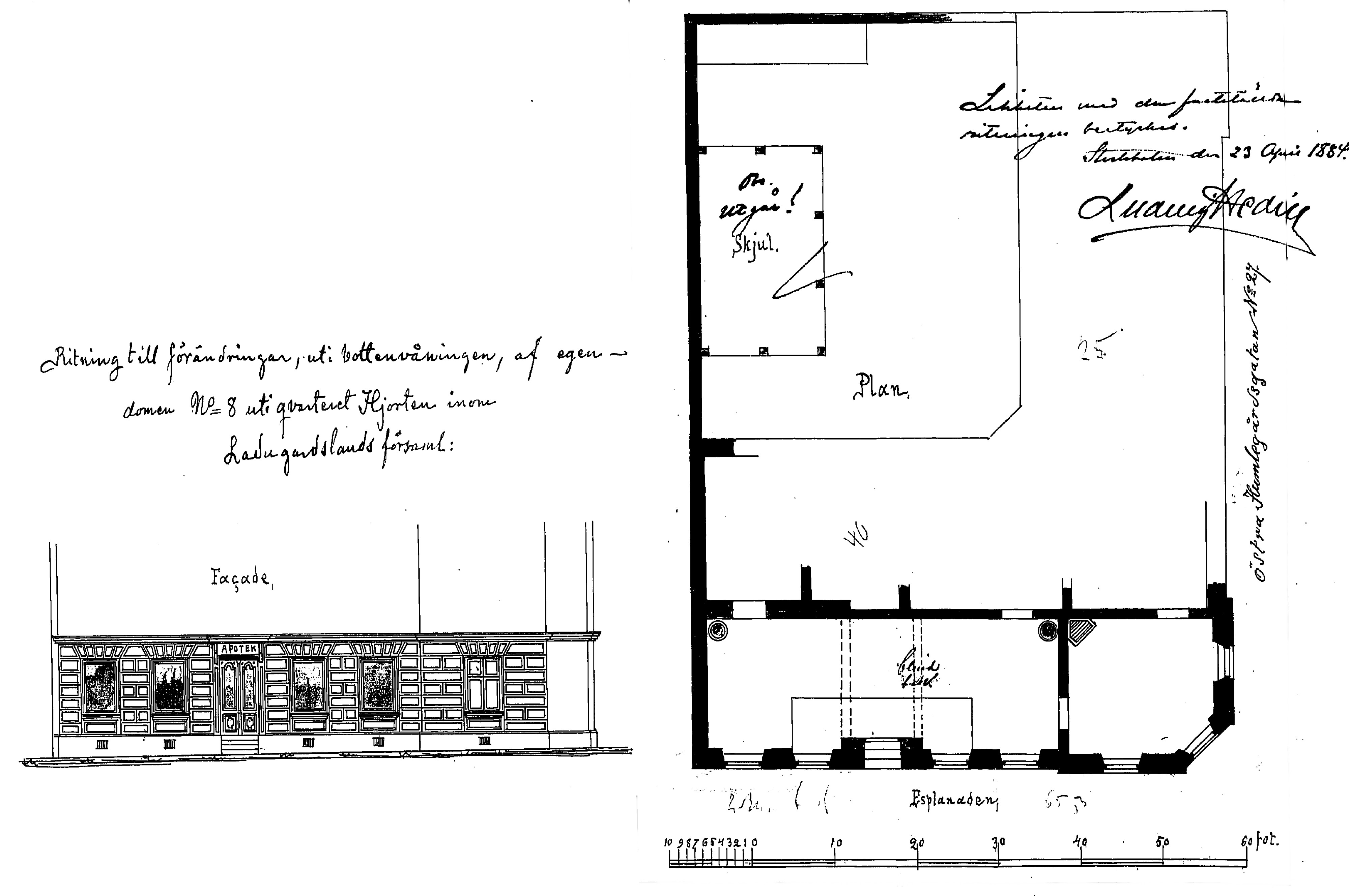 Bygglovsritning för Apoteket Elefanten 1884